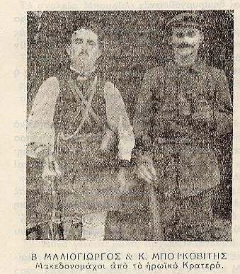 Васил Малиогеоргиев и Константин Бойковски